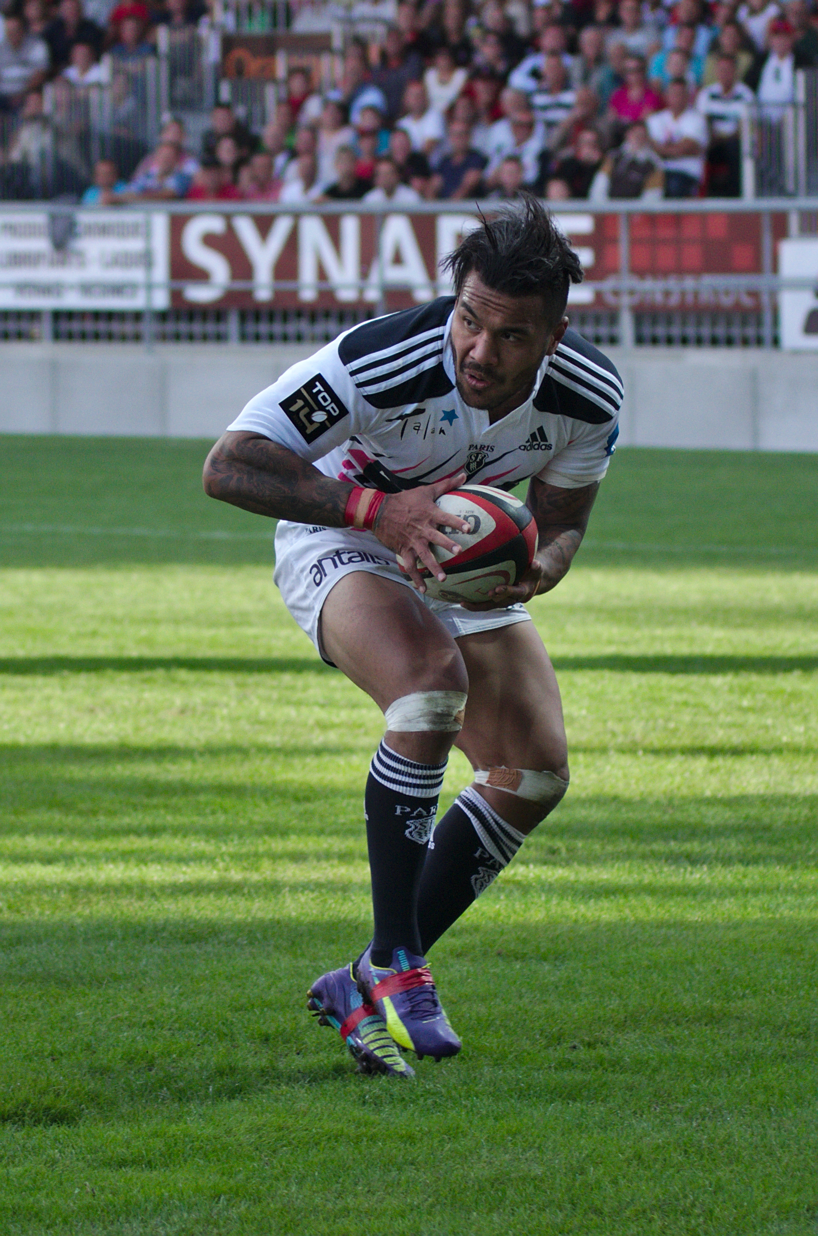 USO-SFP - 20140830